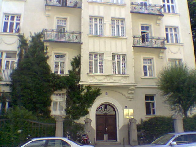 ISF München